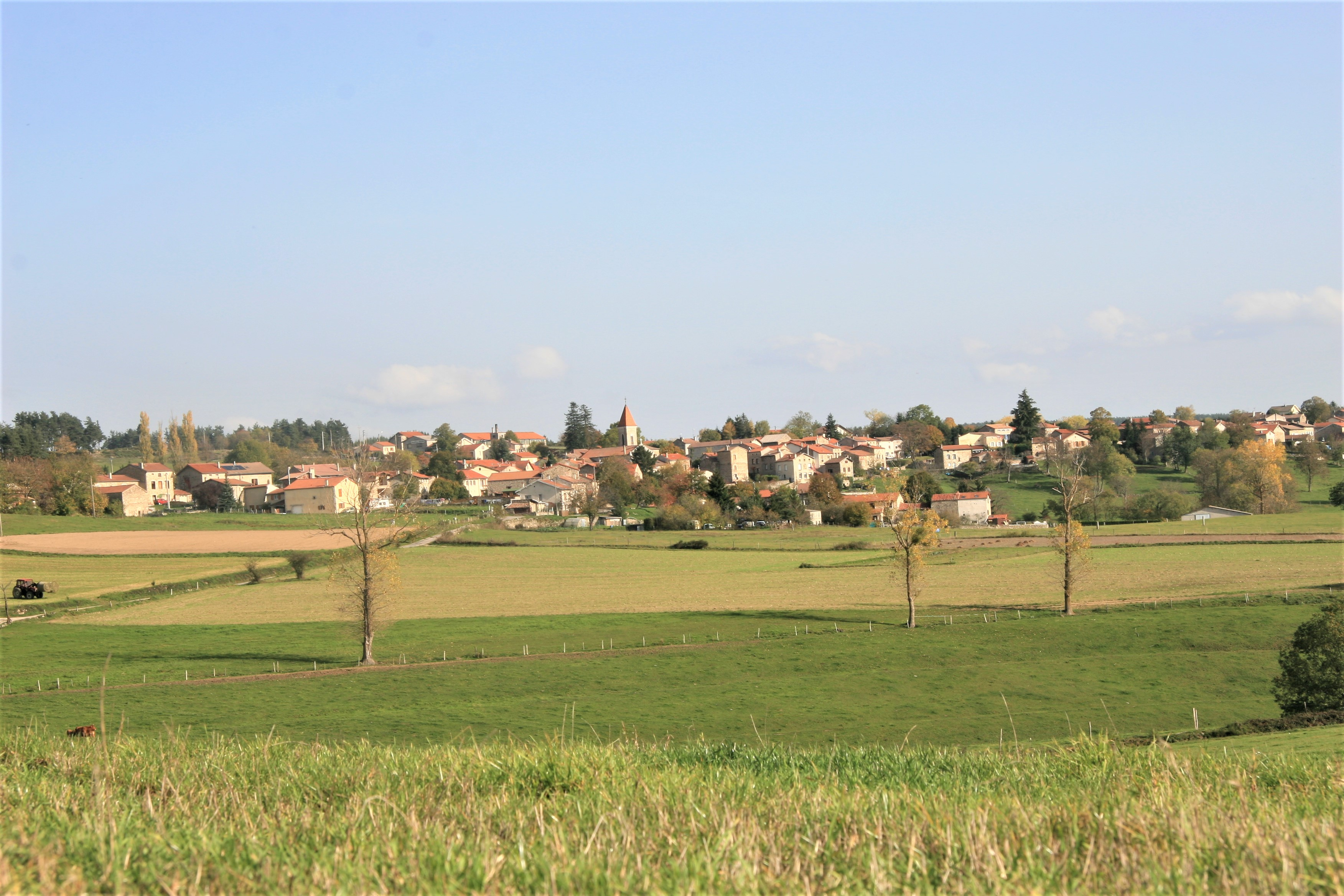 Le bourg du village des Villettes vu depuis le haut des gorges du Lignon